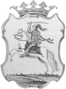 Беларуская (тарашкевіца): Герб Полацкага ваяводзтва (Połacak) з Пагоняй (Pahonia)